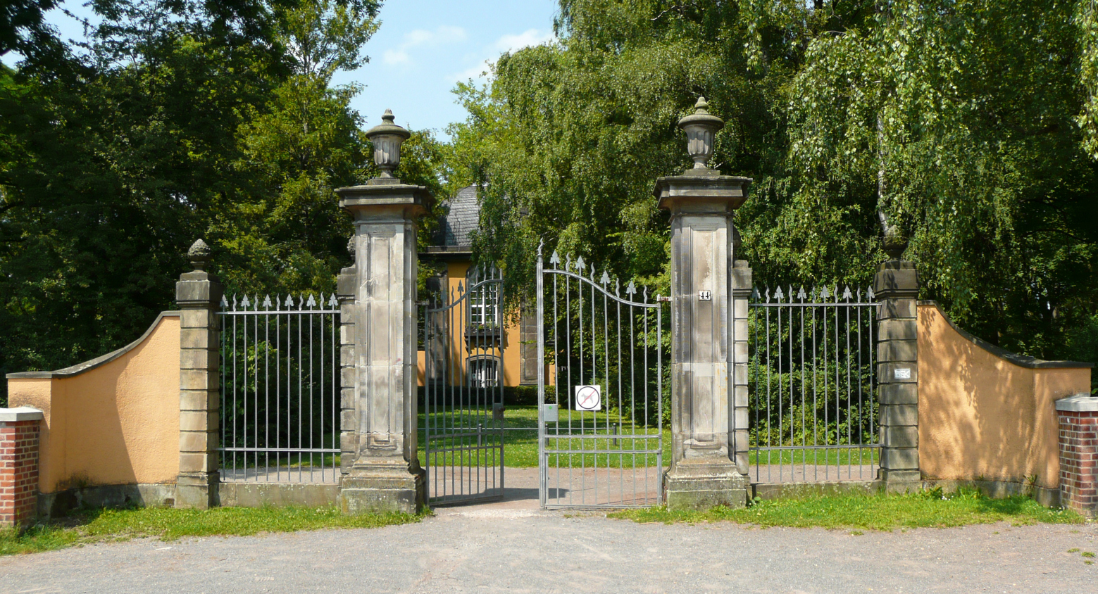 Früheres Eingangsportal des Küchengarten bei Hannover, heute Eingangsportal zum früheren Lindener Bergfriedhof